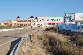 Entrada a Santa Marta